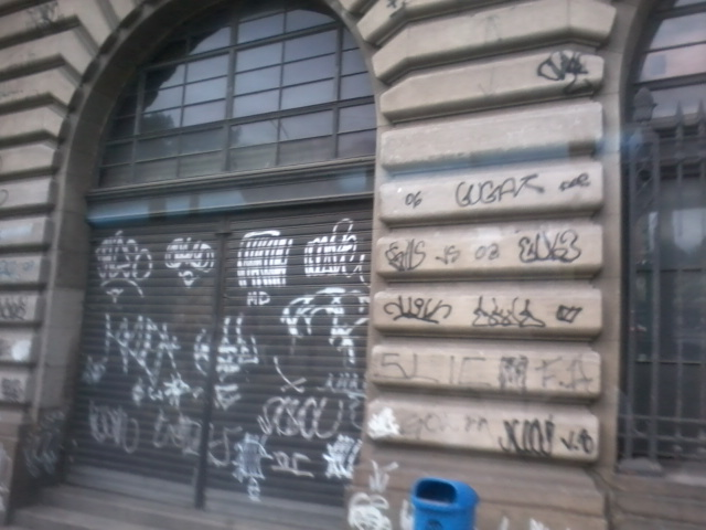 Exterior da Estação de trens Barão de Mauá, atualmente desativada.